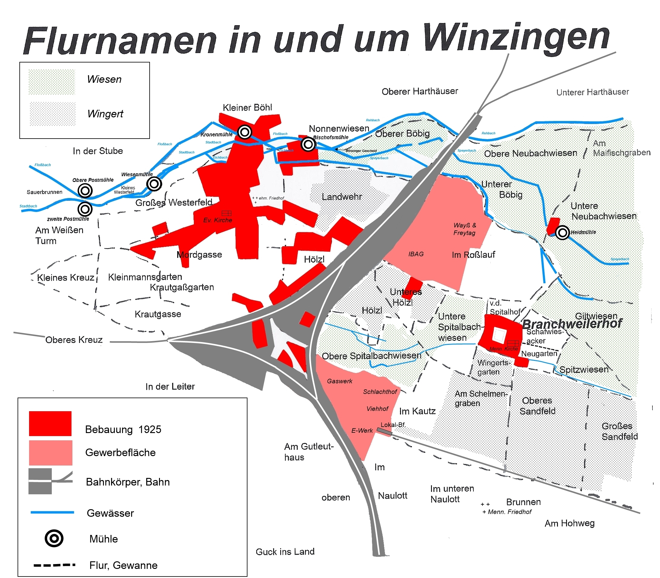 Flurnamen um Wimzingen (Neustadt)